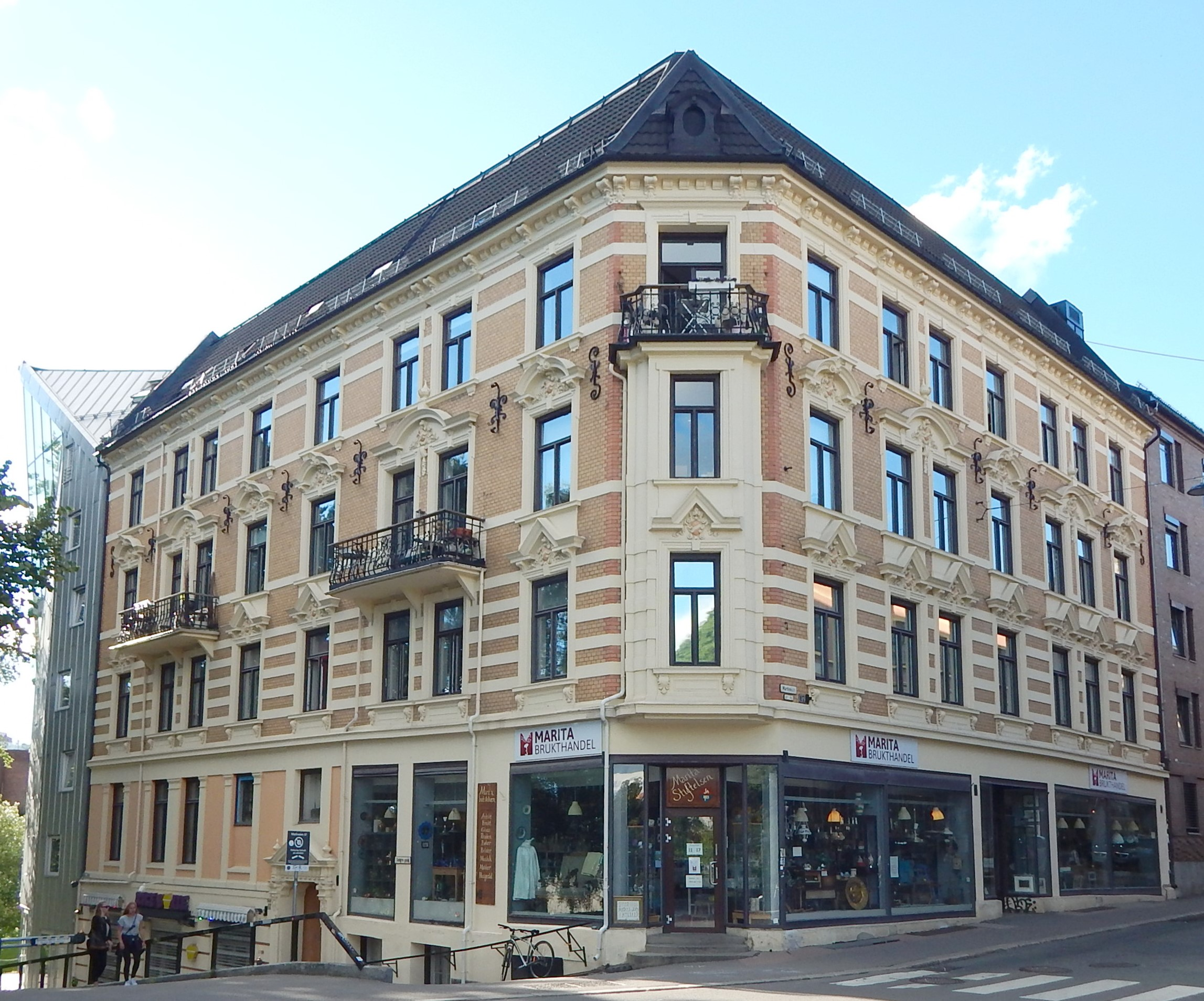 Nesleingården, Markveien 67. Arkitekt: Christian Reuter (1895–96). Listeført hos Byantikvaren.